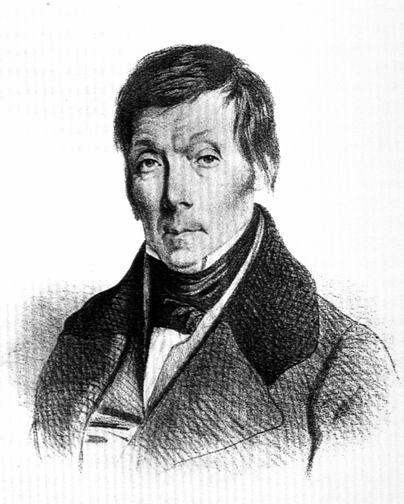 Dominique Cavaillé-Coll, facteur d'orgue, en 1846